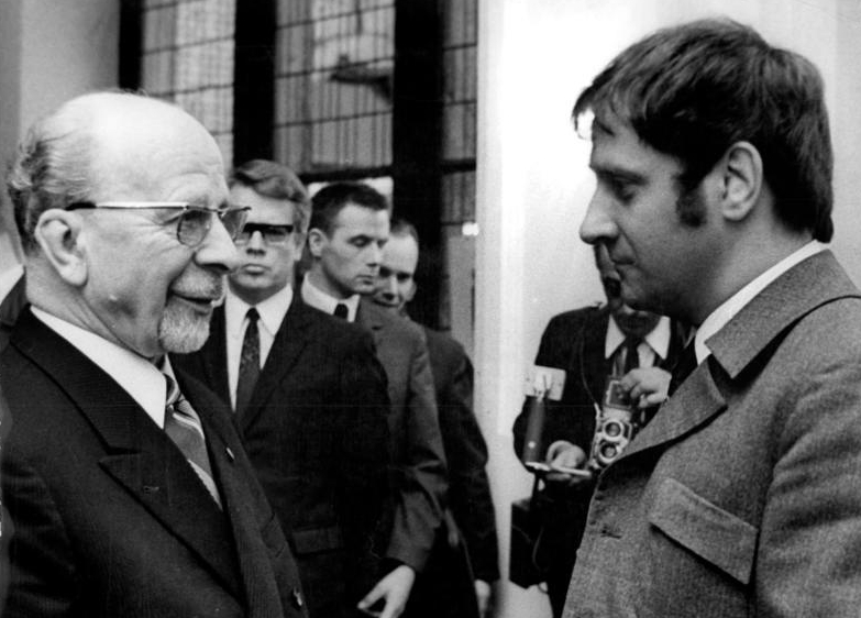 Zentralbild Koch 26.3.1970 Halle: 23. Sitzung des Staatsrates in Merseburg. Am 25. und 26. März 1970 trat im Haus der Kultur in Merseburg der Staatsrat der DDR zu seiner 23. Sitzung zusammen. Unter Leitung seines Vorsitzenden Walter Ulbricht (l.) beriet er die Wissenschaftsorganisation in der chemischen Industrie. Zu den mehr als hundert Gästen gehörte auch der Schriftsteller und Fernsehautor Benito Wogatzki (r.).